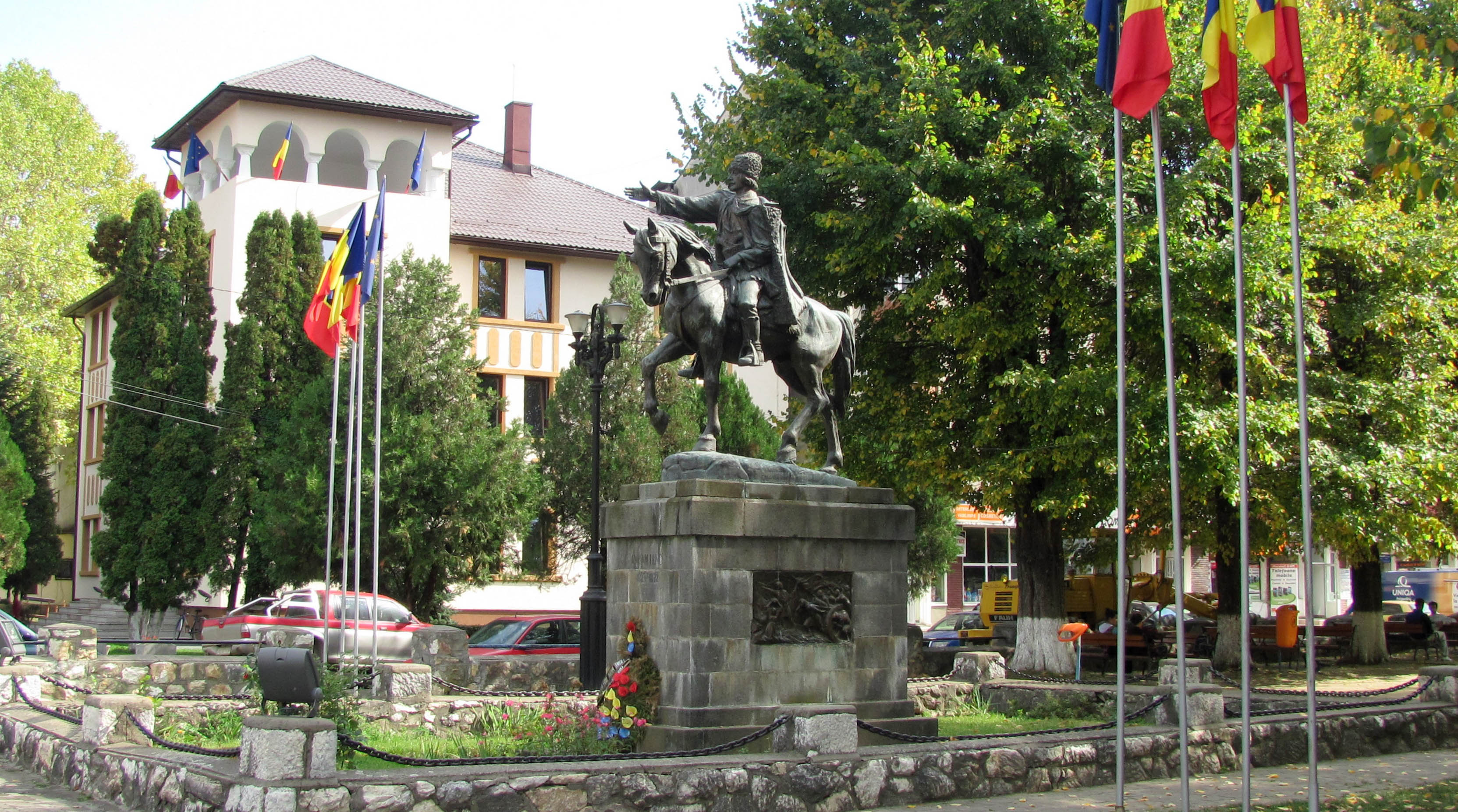 Statuia ecvestră a lui Avram Iancu (Câmpeni)